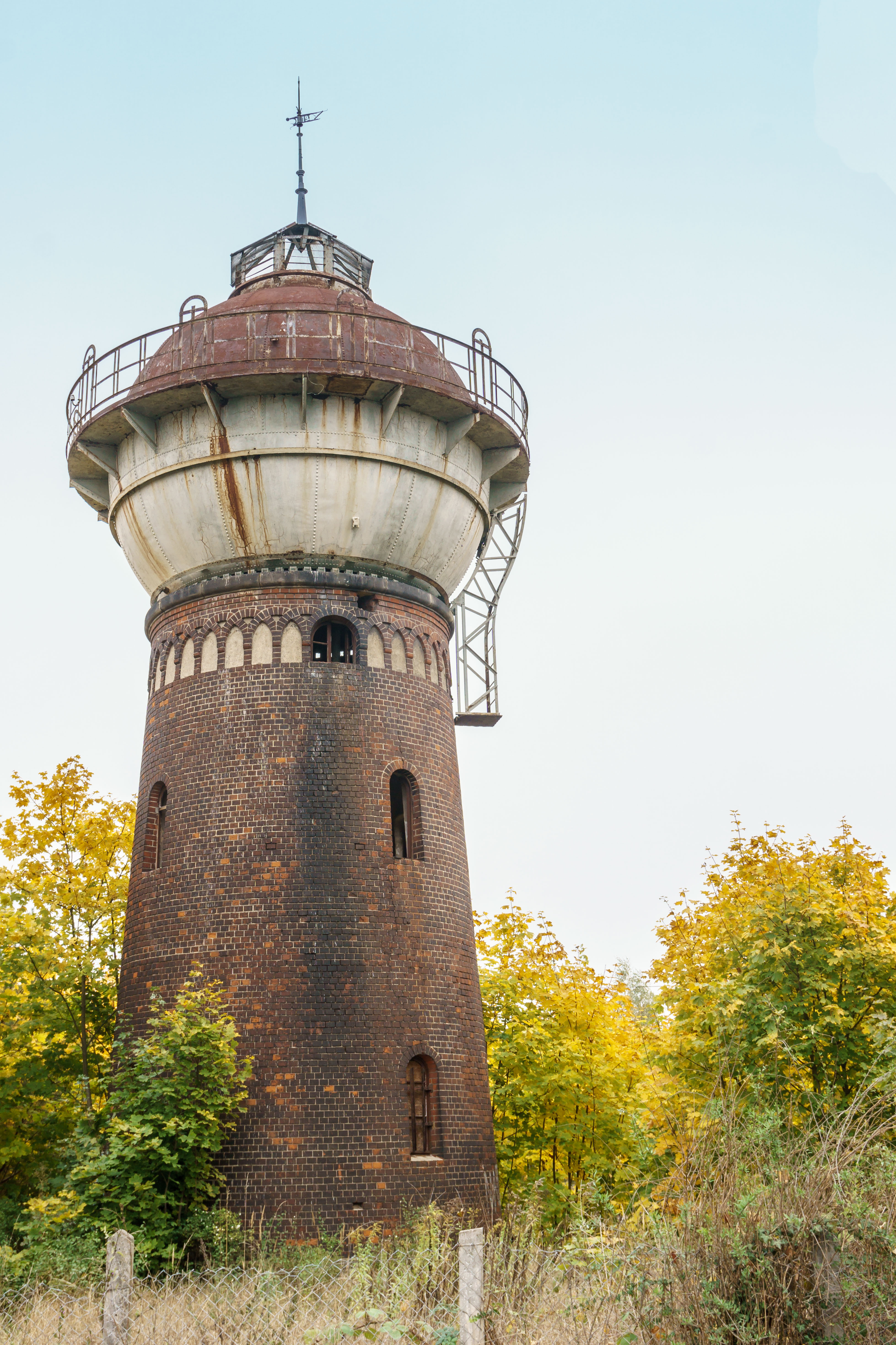 Bahnwasserturm, Bebelstraße in Genthin